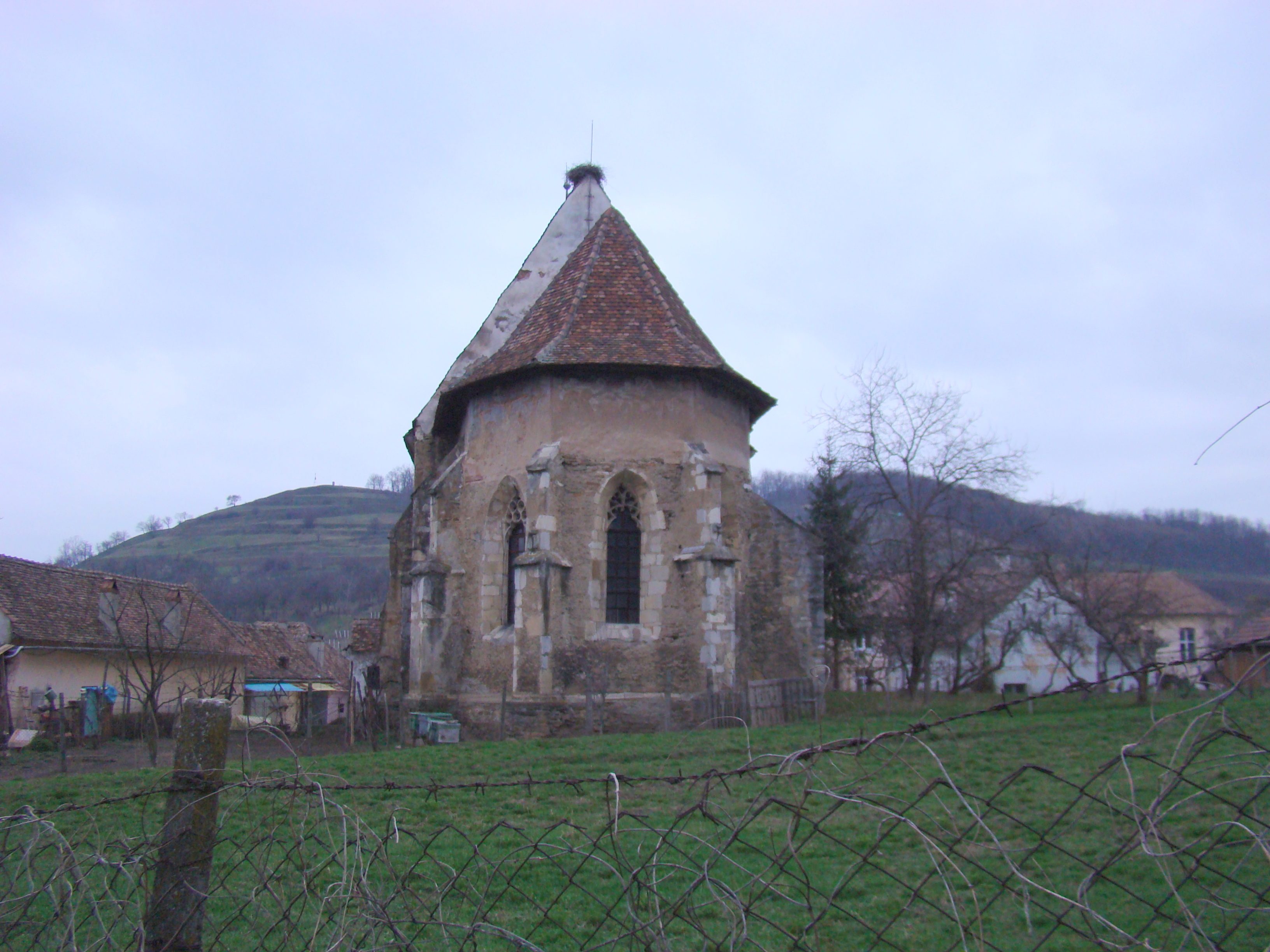 Biserica evanghelică, sat DÂRLOS; comuna DÂRLOS, județul Sibiu